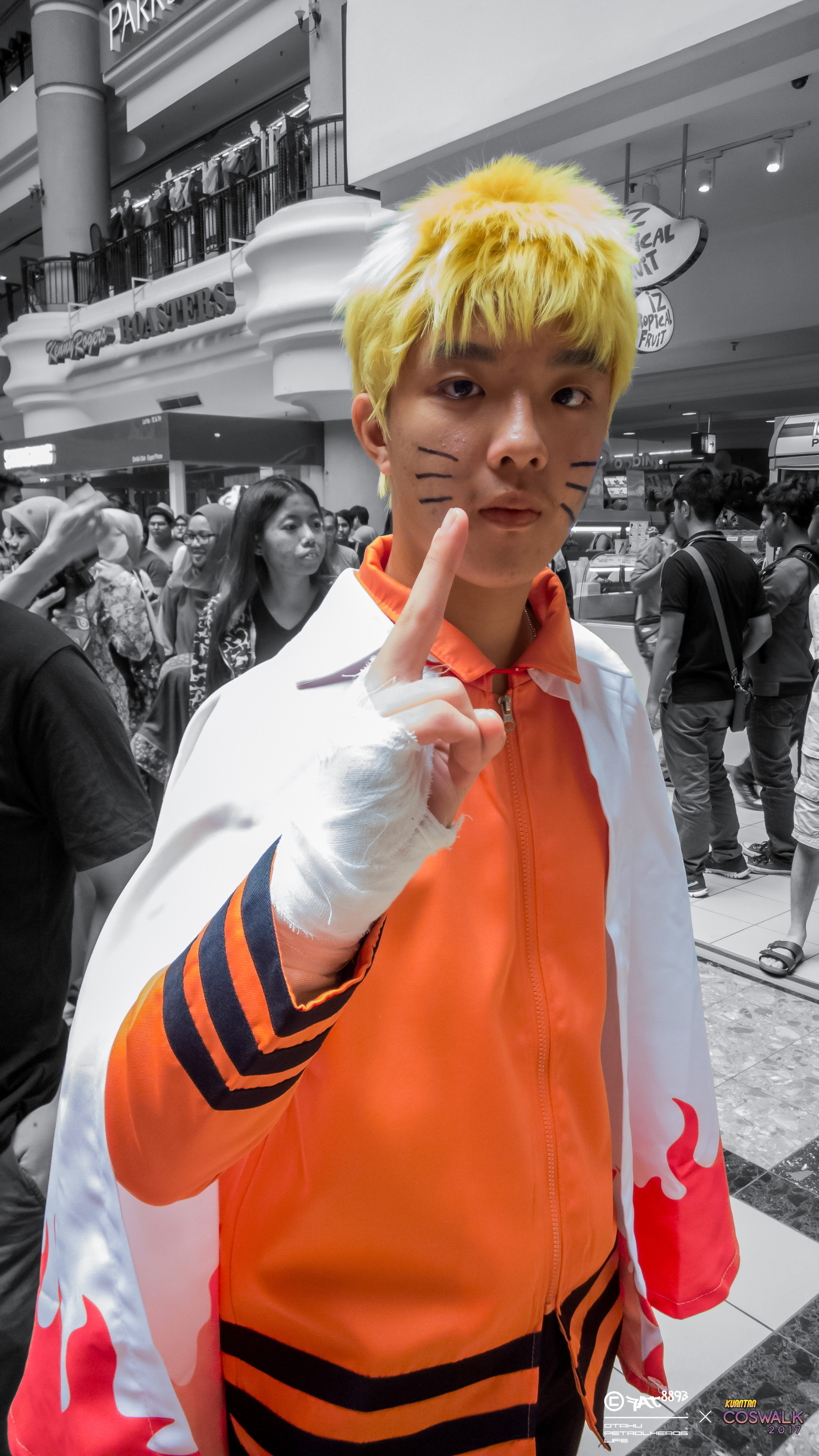 Kuantan CosWalk 2017，《火影忍者》漩渦鳴人第七代火影版cosplayer。